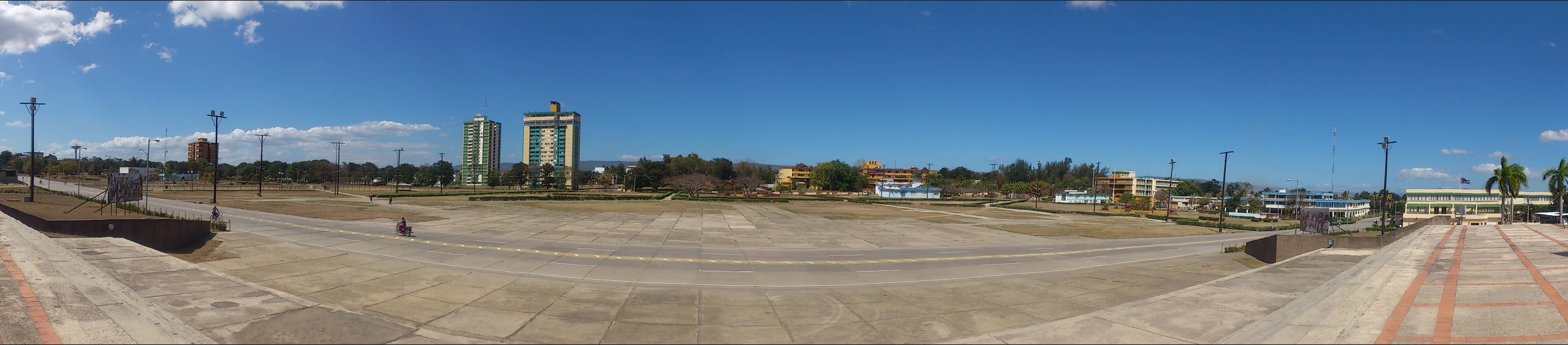 Panorama de la Ciudad Guanatanamo